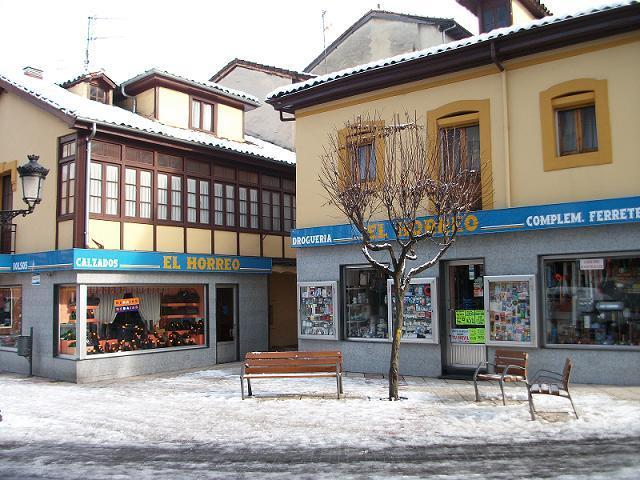 Viviendas antiguas La Felguera (Langreo), Asturias